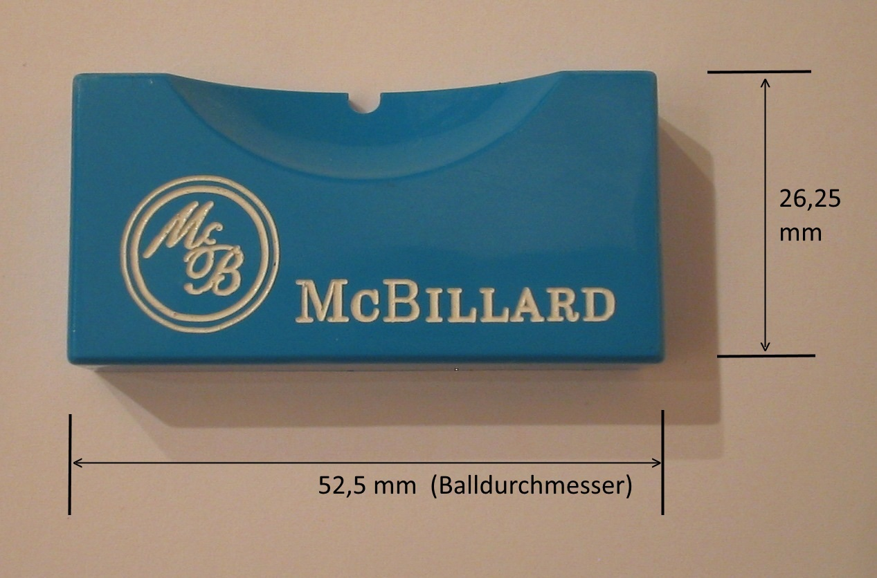 Hilfsmittel Ball-Marker für Snooker: Die innere Hohlform entspricht dem Ball zur Markierung der Lage z.B. beim Reinigen. Die Breite entspricht dem exakten Balldurchmesser = 52,5 mm zum Ausmessen ob zwischen eng liegenden Bällen noch Platz ist (z.B. wenn Pink so nah wie möglich an den eigenen Spot gelegt werden muß), die Höhe entspricht dem halben Balldurchmesser 26,25 mm zum Ausmessen, ob ein Ball noch auf den eigenen Spot paßt.